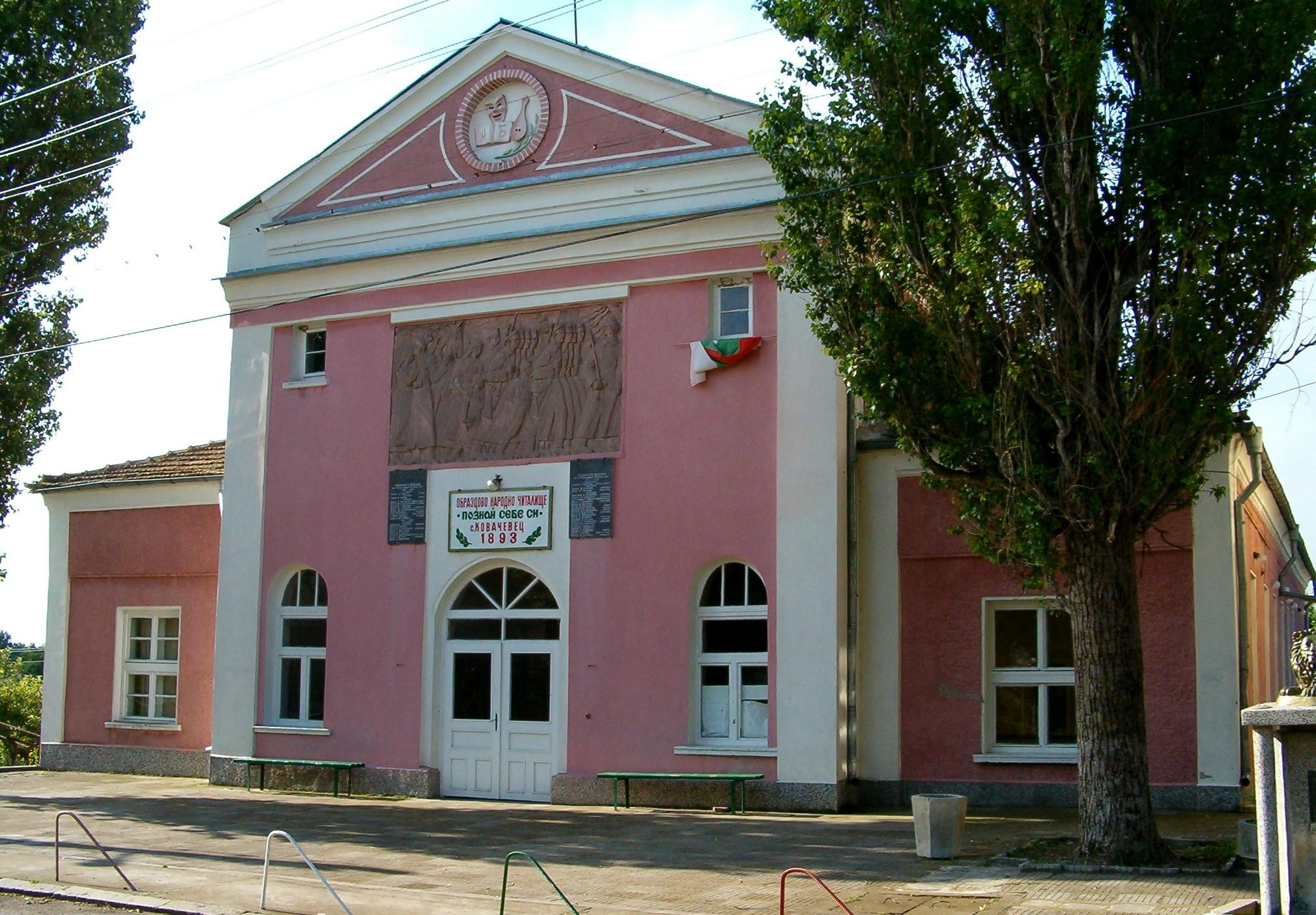 Читалищната сграда на Народно читалище "Познай себе си" - село Ковачевец, Поповско - 2006 год.